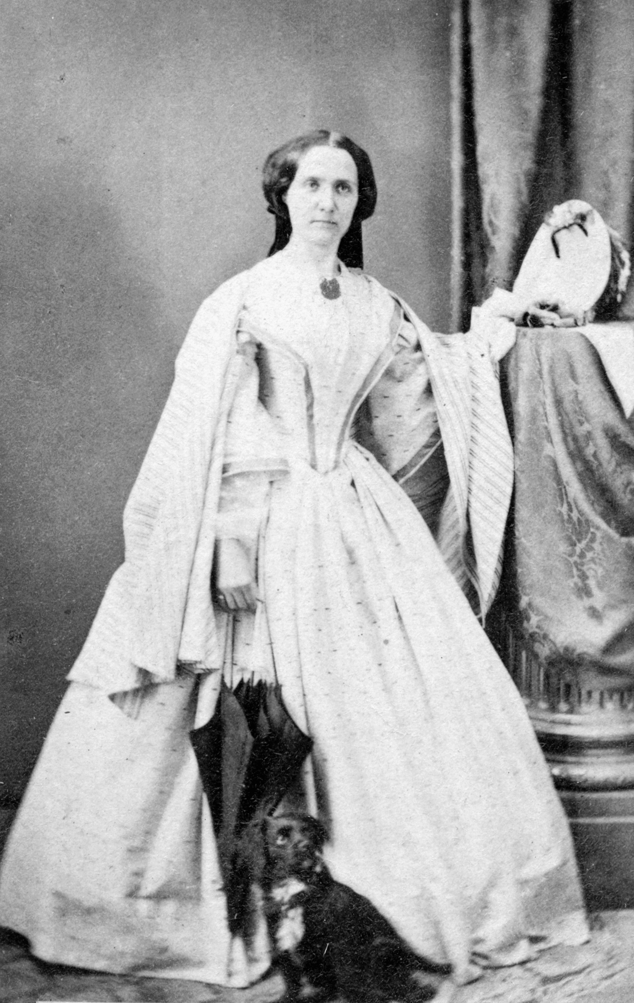 Louise Åhman, skådespelare vid Oscar Anderssons sällskap 1862